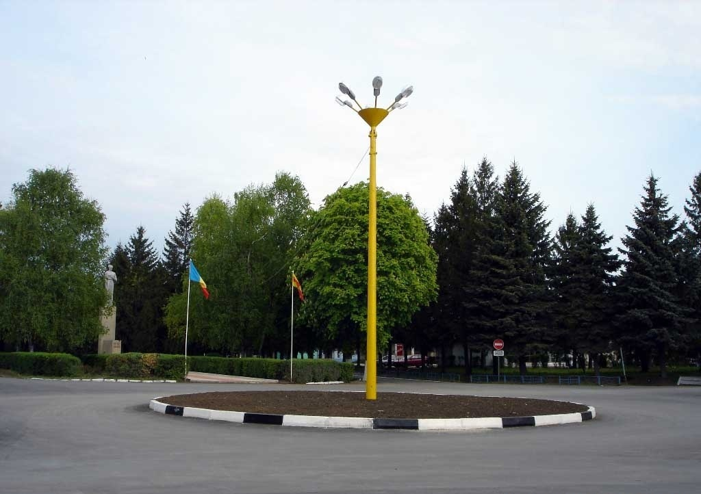 Rondul din centrul orașului Briceni